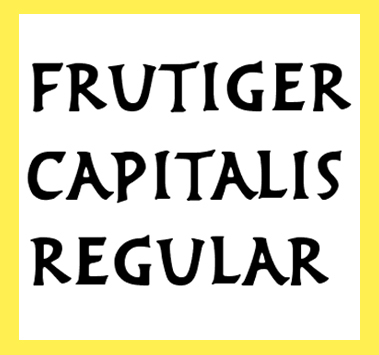 Mostra de Frutiger Capitalis Regular